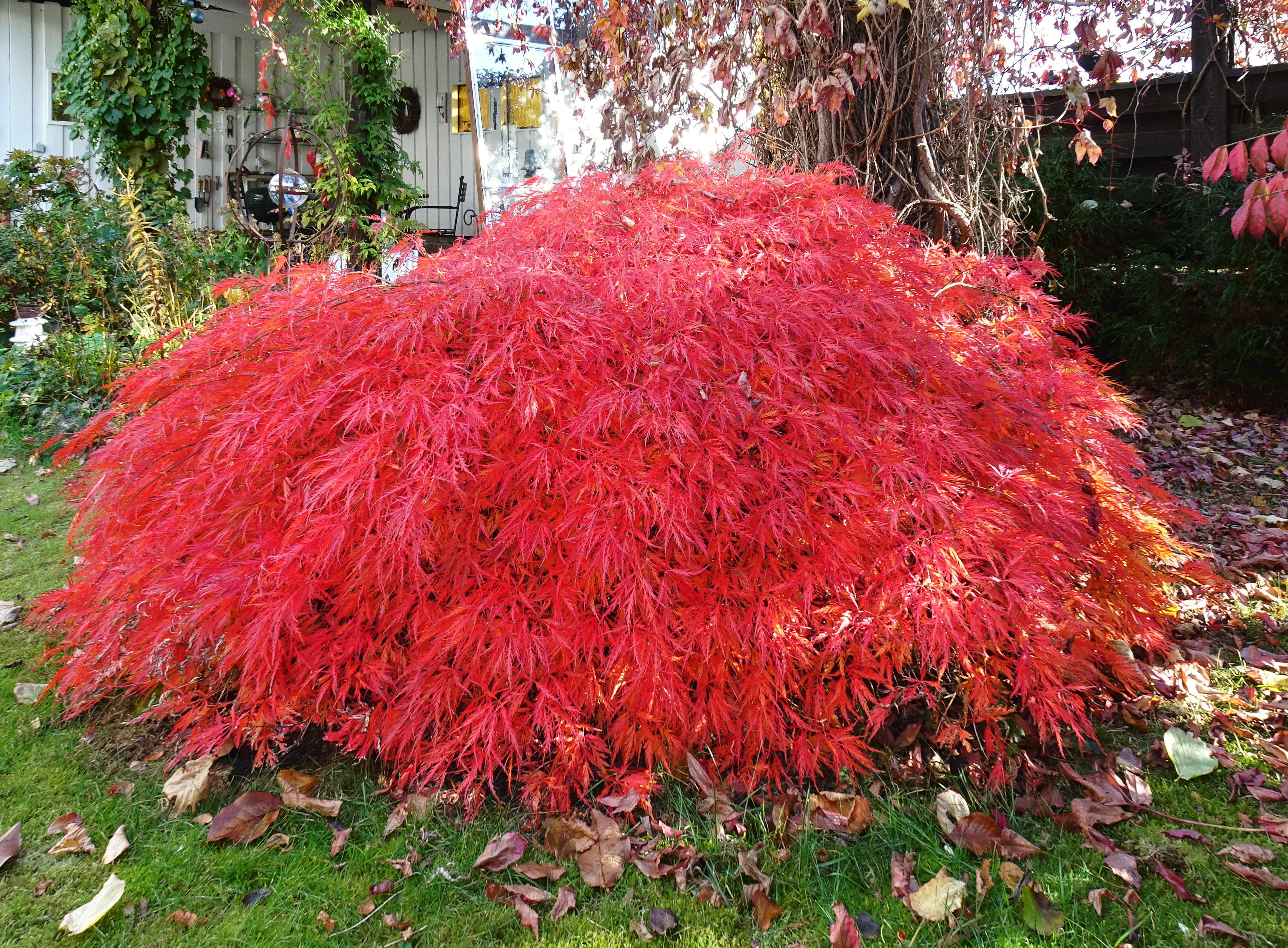 Japansk lönn (Acer japonicum) i höstskrud